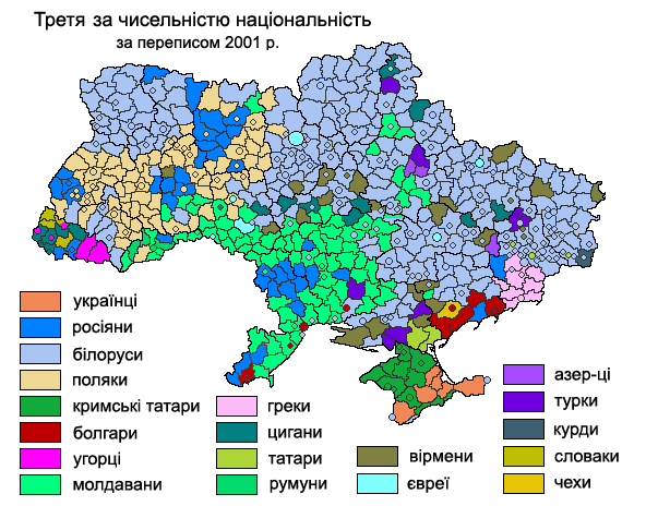 Third nationality according to the 2001 census: Третя за чисельністю національність за даними перепису 2001 року